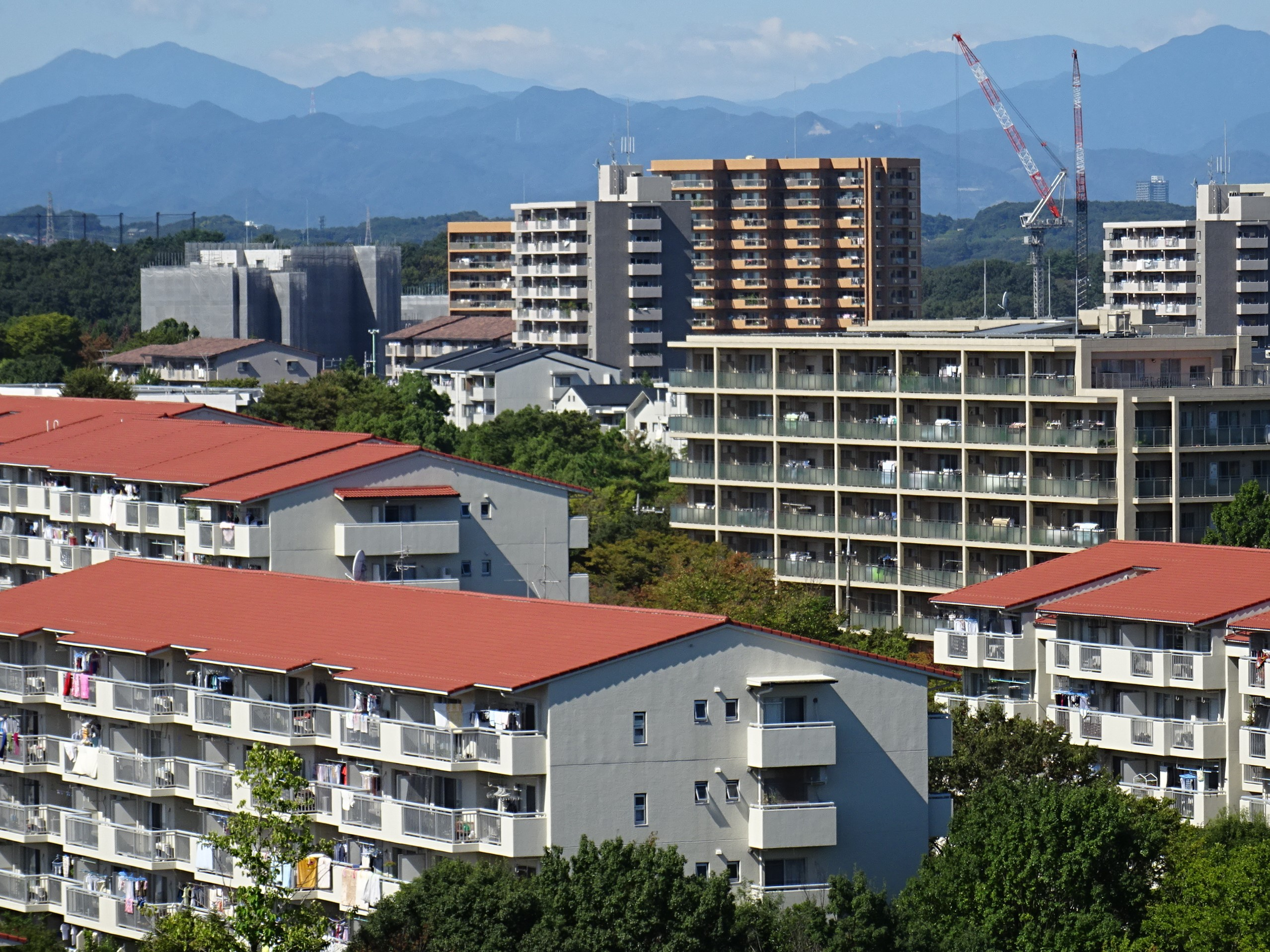 多摩市鶴牧の多摩ニュータウンのマンション群（2015/10/08撮影）